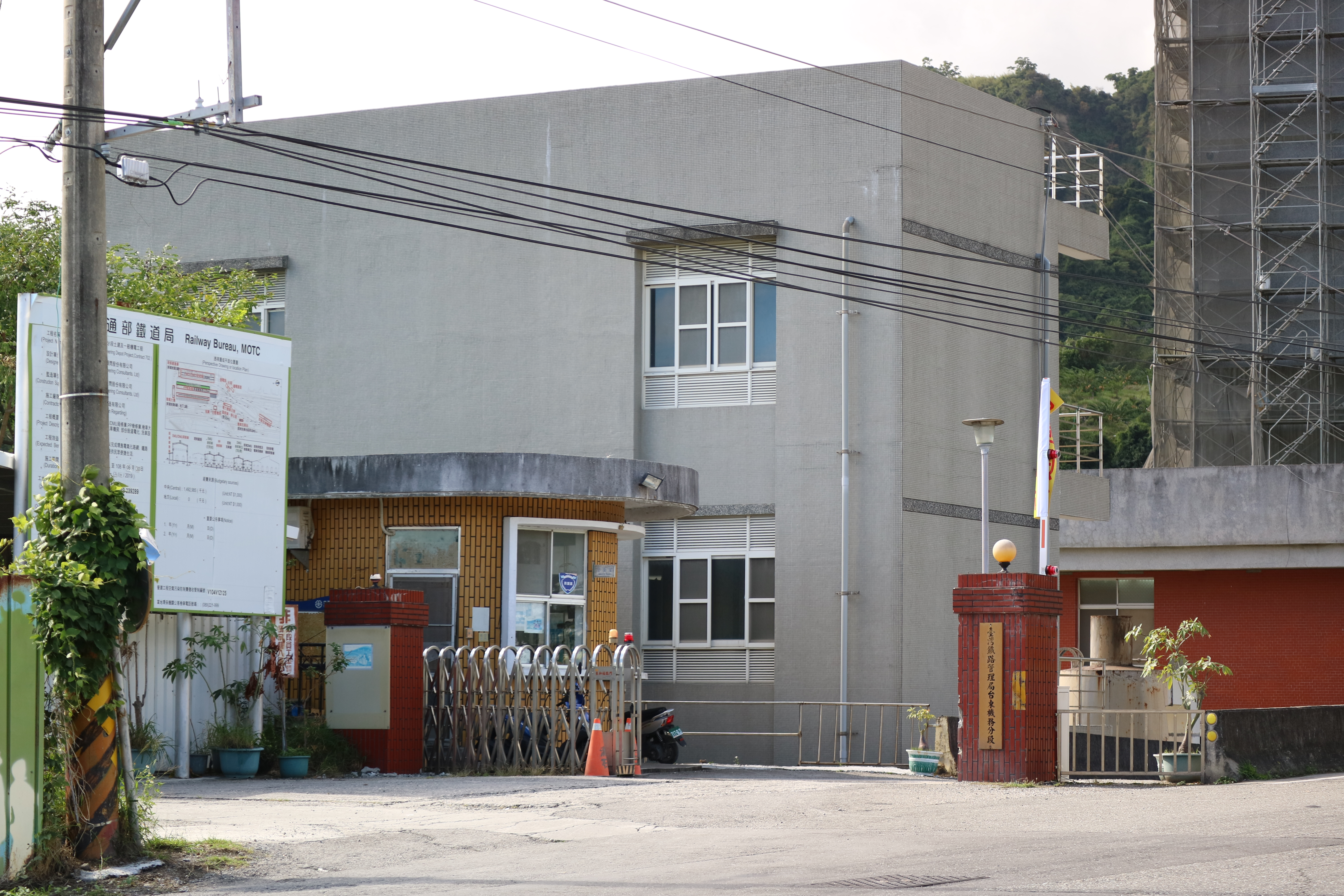 臺灣鐵路管理局花蓮機務段臺東機務分段，地址：臺東縣臺東市岩灣路101巷27號。